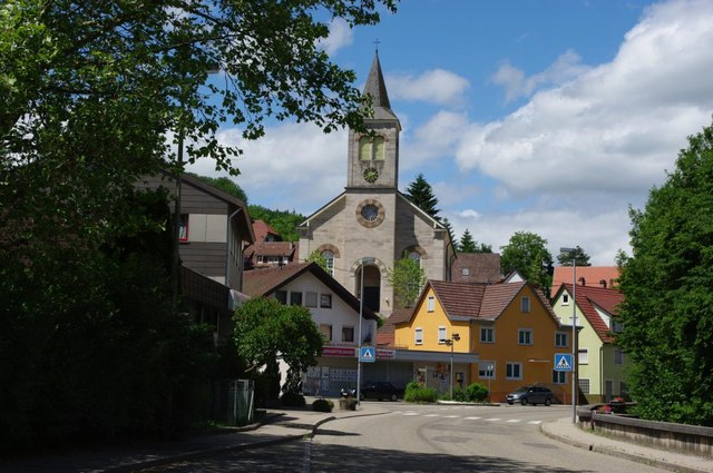 Spiegelberg - Blick auf die Kirche